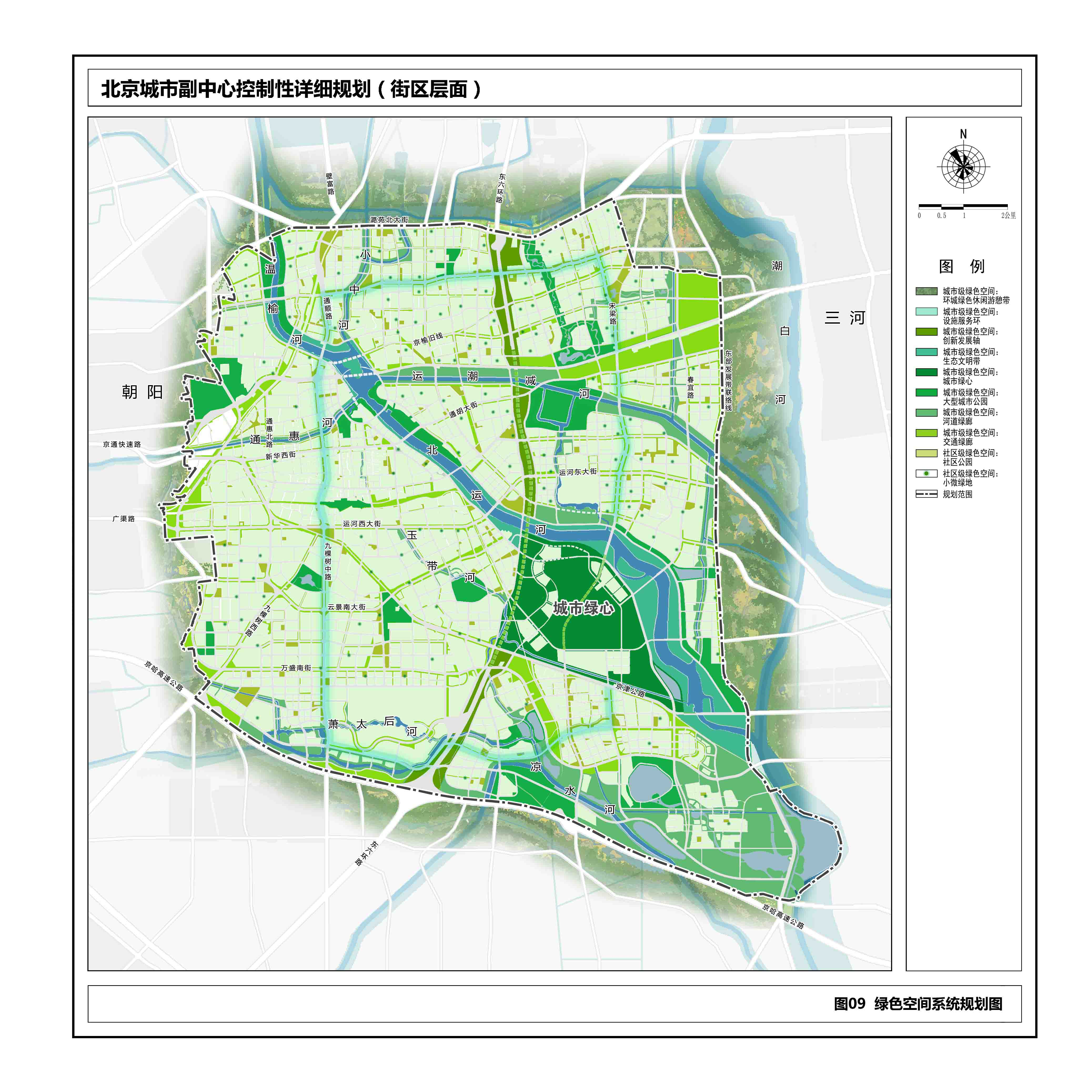 中文（中国大陆）: 北京城市副中心控制性详细规划（街区层面）（2016年-2035年）